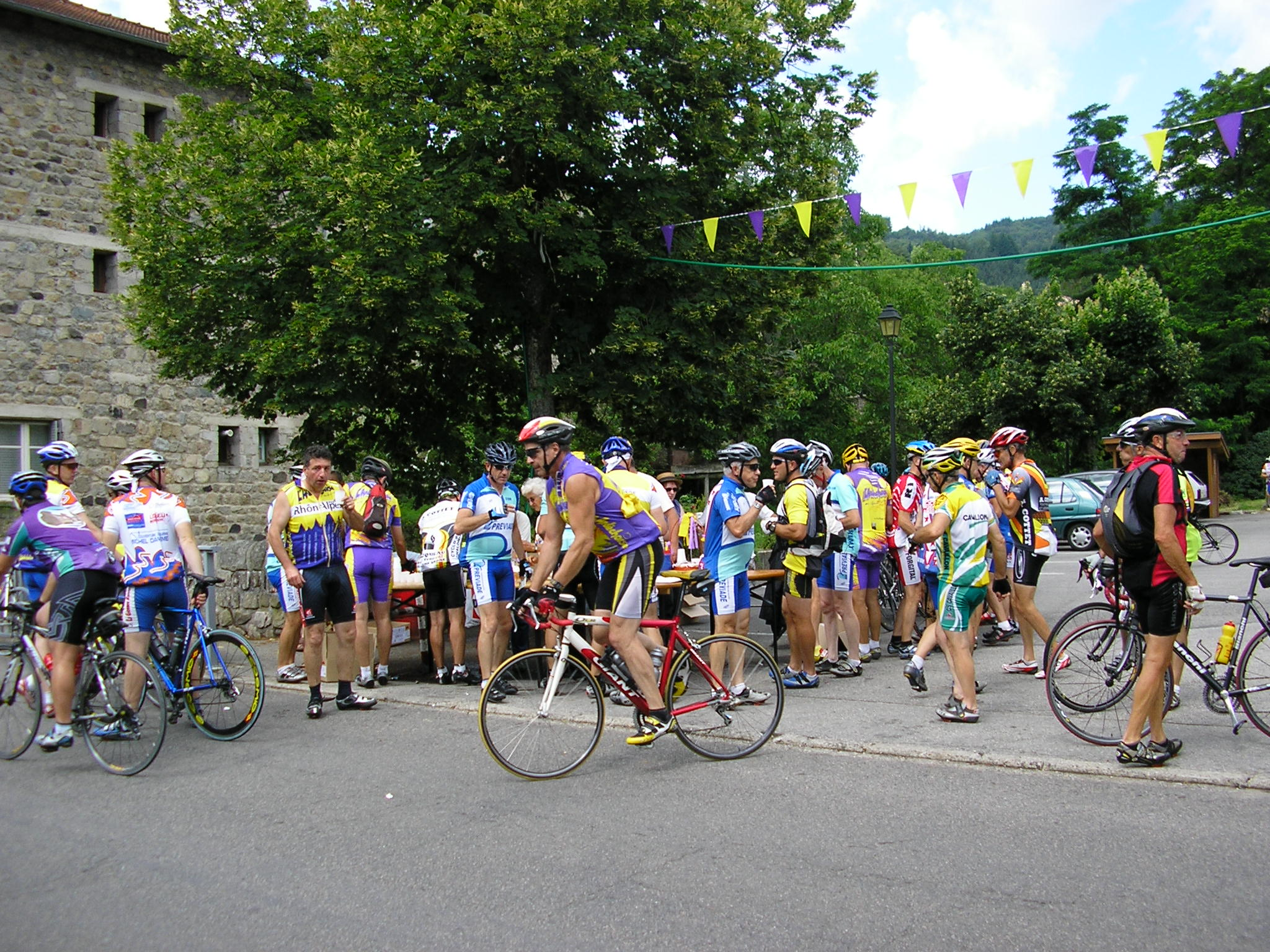 Cette image représente des coureurs cyclistes de L'Ardéchoise en ravitaillement d'eau à Mariac.